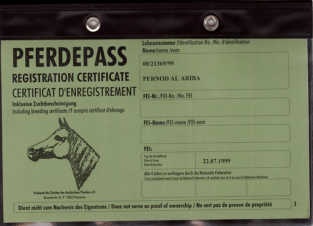 Equidenpass von Pernod Al Ariba